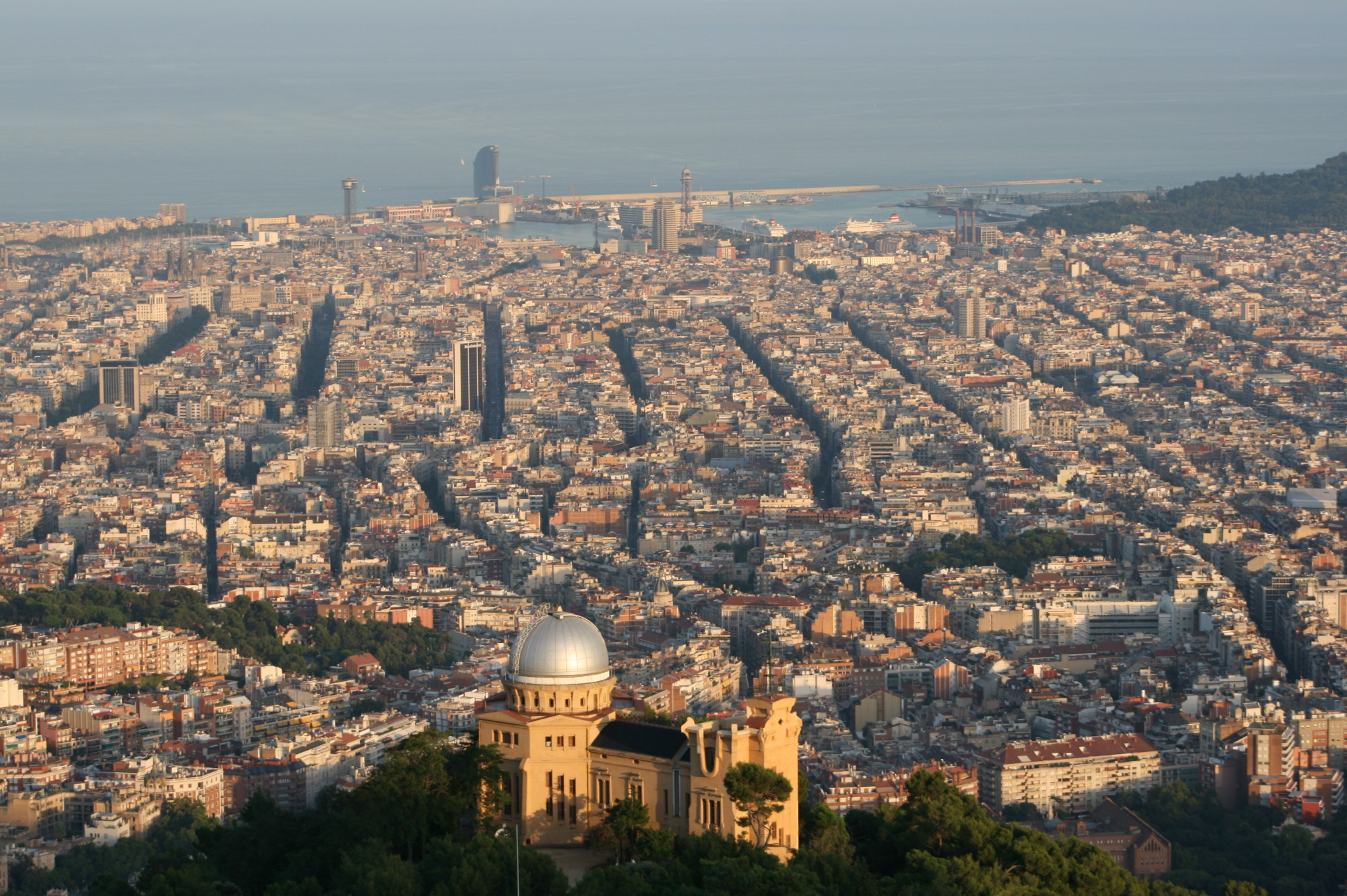 Vista de l'Observatori Fabra amb Barcelona de fons